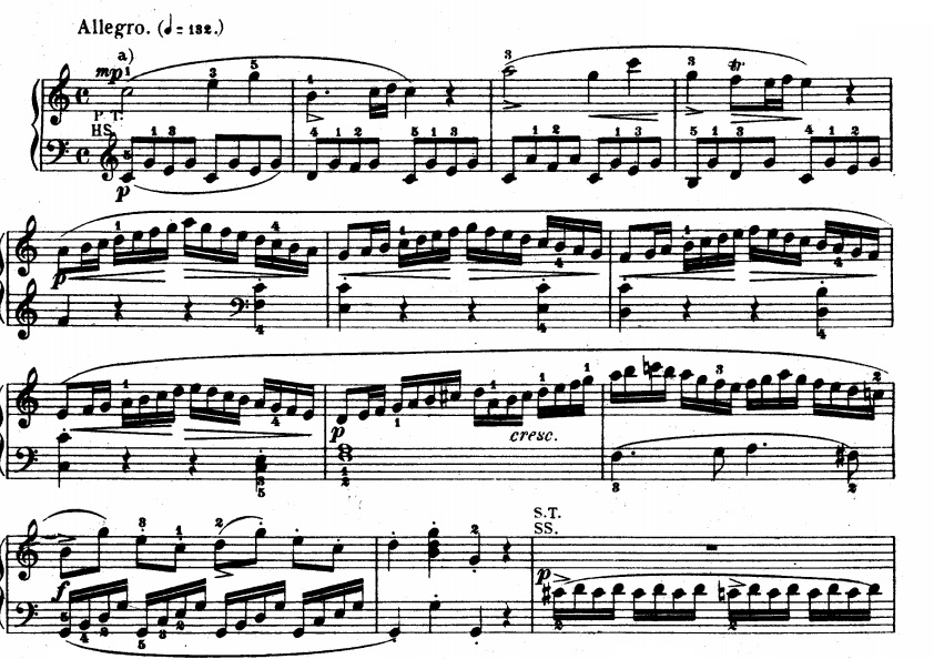 text